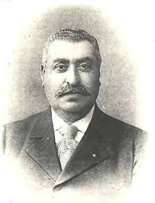 Александр Иванович Манташев (Александр Ованесович Манташьянц, арм. Ալեքսանդր Մանթաշյան; 1842, Тифлис — 19 апреля 1911, Санкт-Петербург) — крупнейший российский нефтяной магнат и филантроп. Был одним из самых богатых людей своего времени.